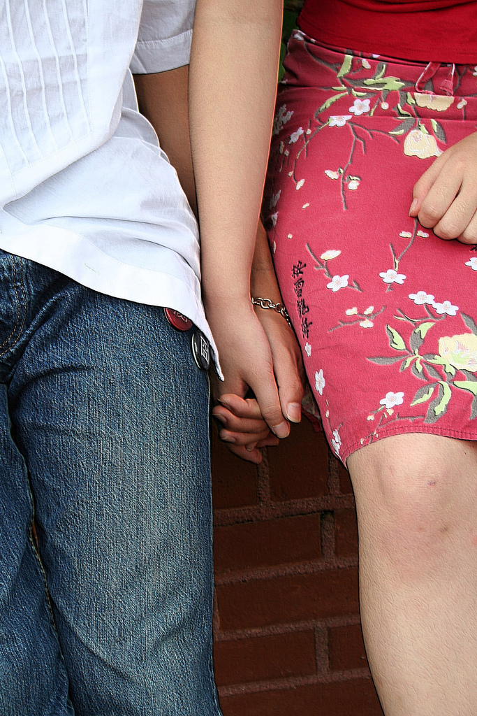 "Discreet lovers". 2 women Emboss.